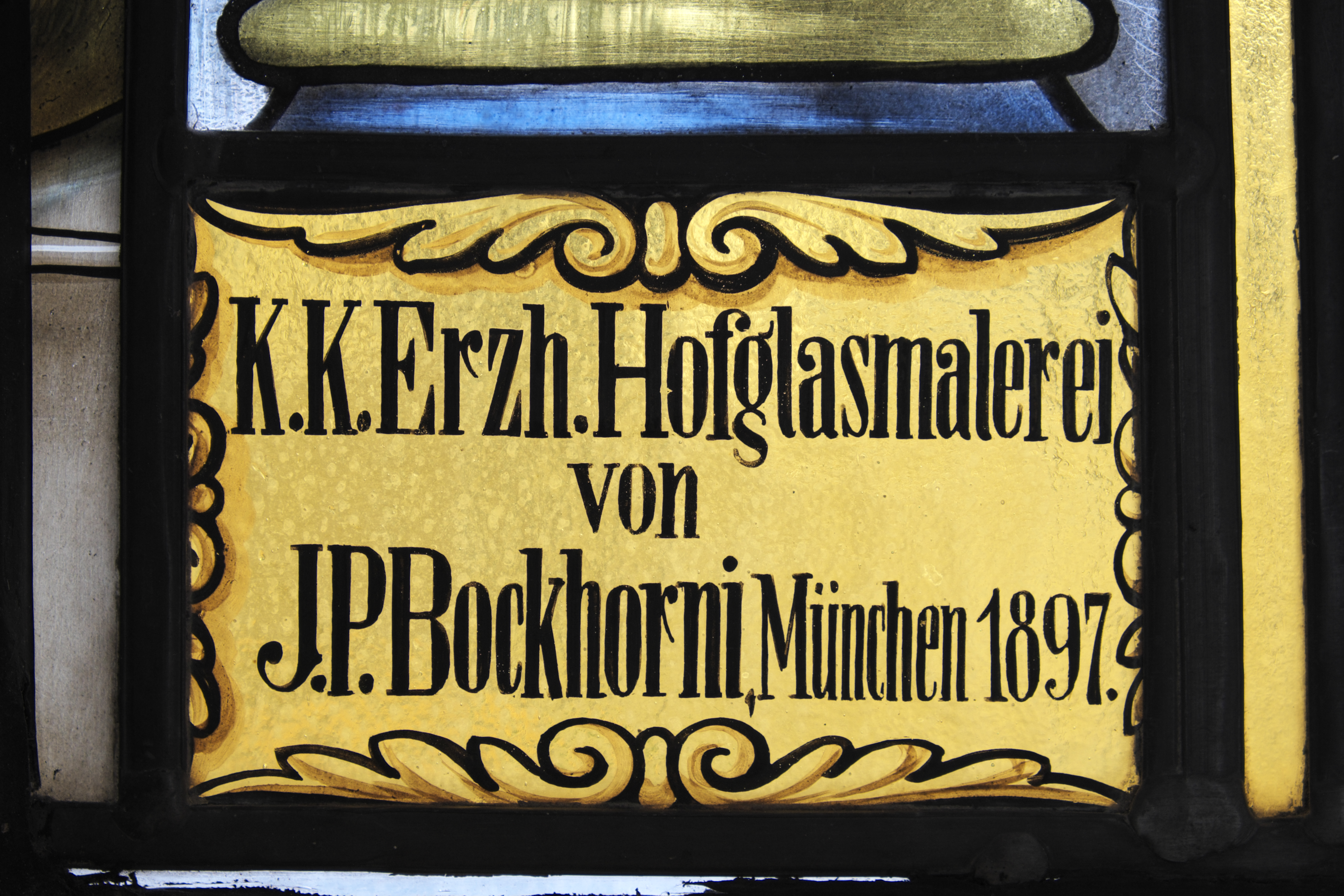 Gnadenkapelle in Speiden (Eisenberg (Allgäu)) im Landkreis Ostallgäu (Bayern/Deutschland), Bleiglasfenster der Glasmalereiwerkstatt von Josef Peter Bockhorni, von 1888 und 1897; Darstellung: Jesus unter den Schriftgelehrten; Signatur: K.K.Erzh.Hofglasmalerei von J.P.Bockhorni,München 1897. (Ausschnitt)